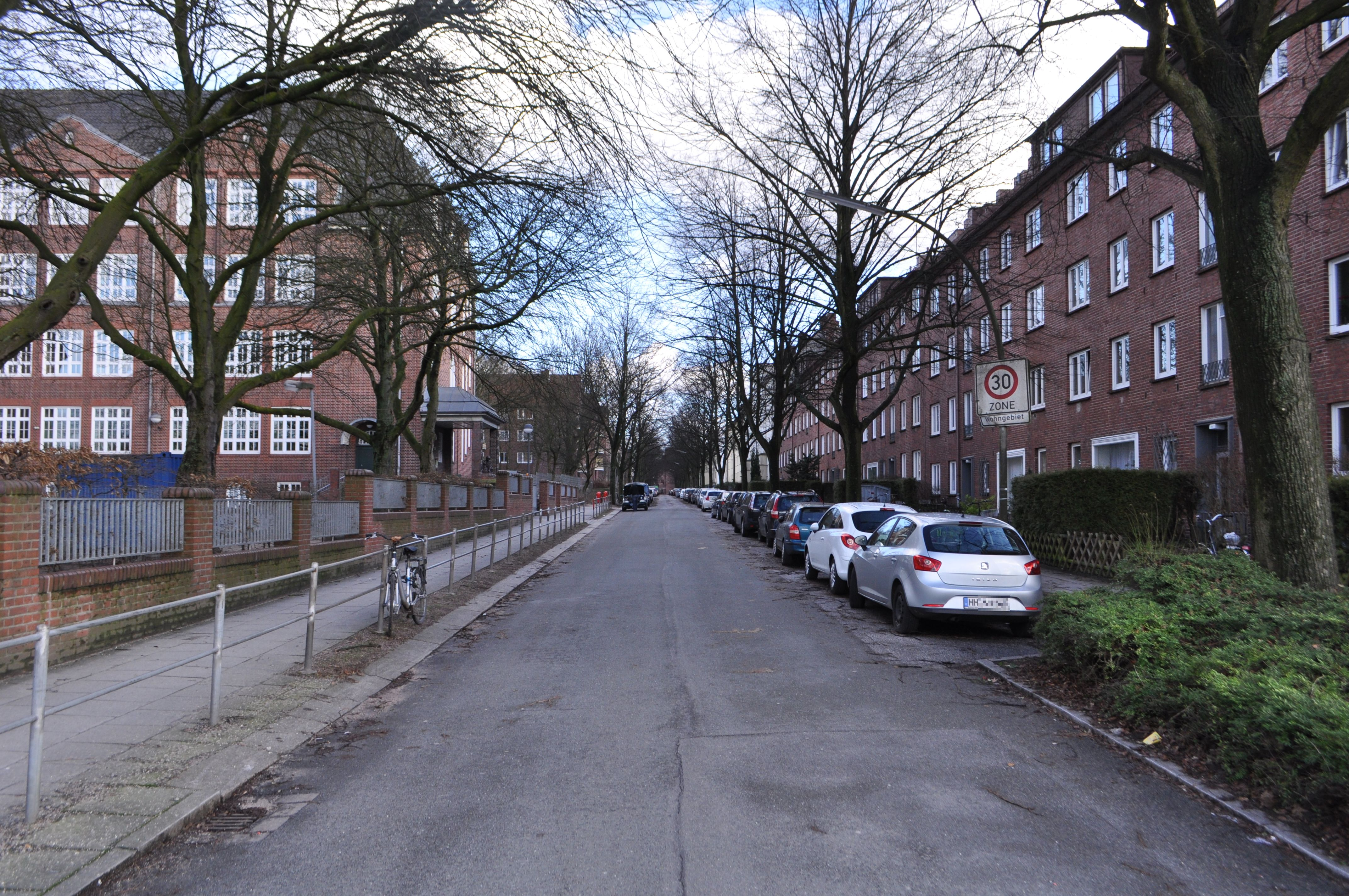 Genslerstraße in Hamburg-Barmbek-Nord, vom Rübenkamp gesehen.